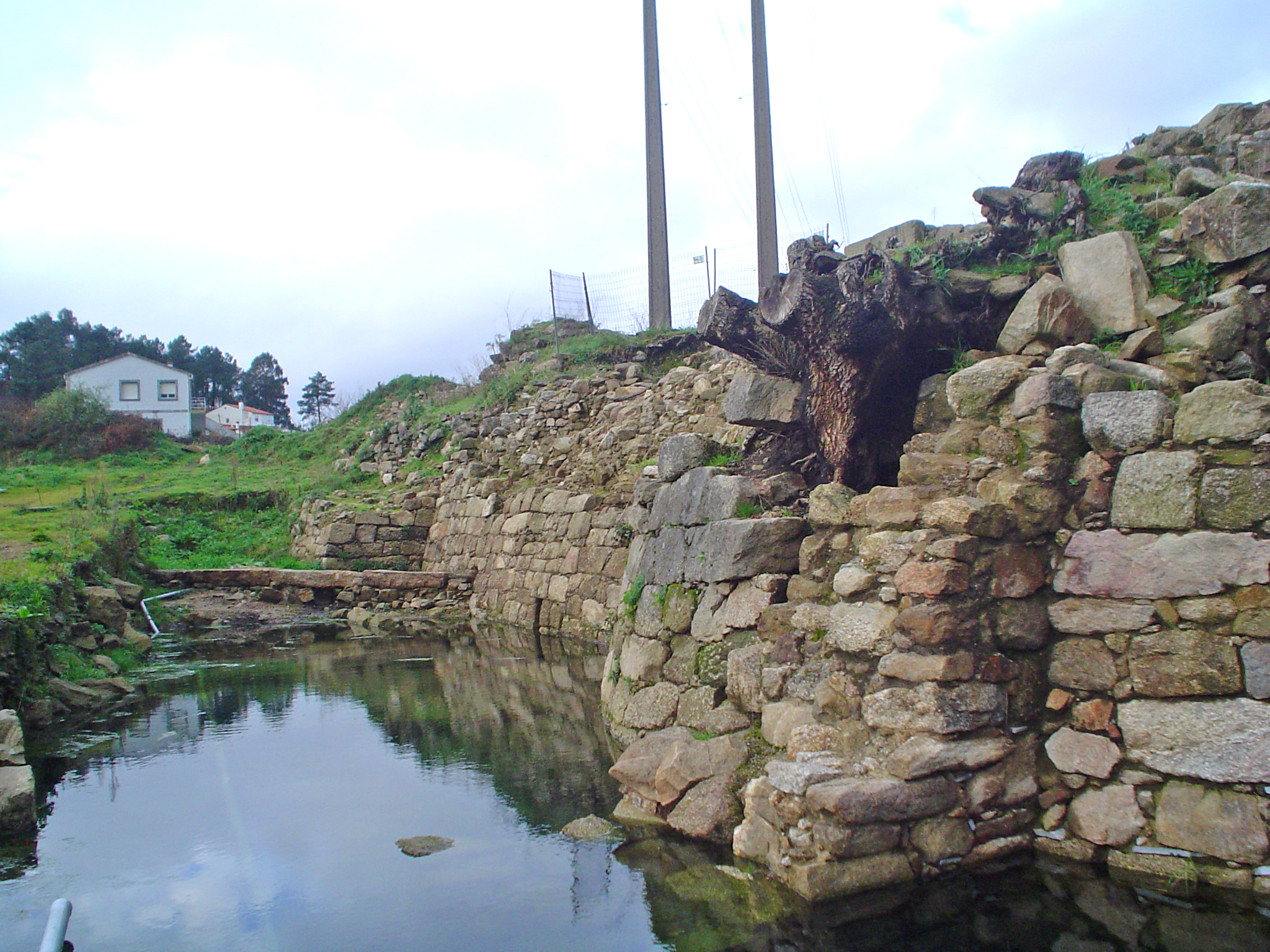 Castelo da Rocha forte. Conxo - Santiago. foxo e muro suroeste e posibles cimentos de torre